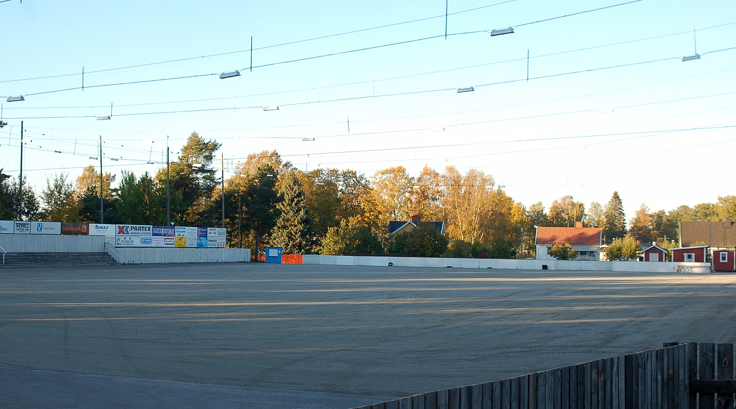 Otterbäckens bandyrink.